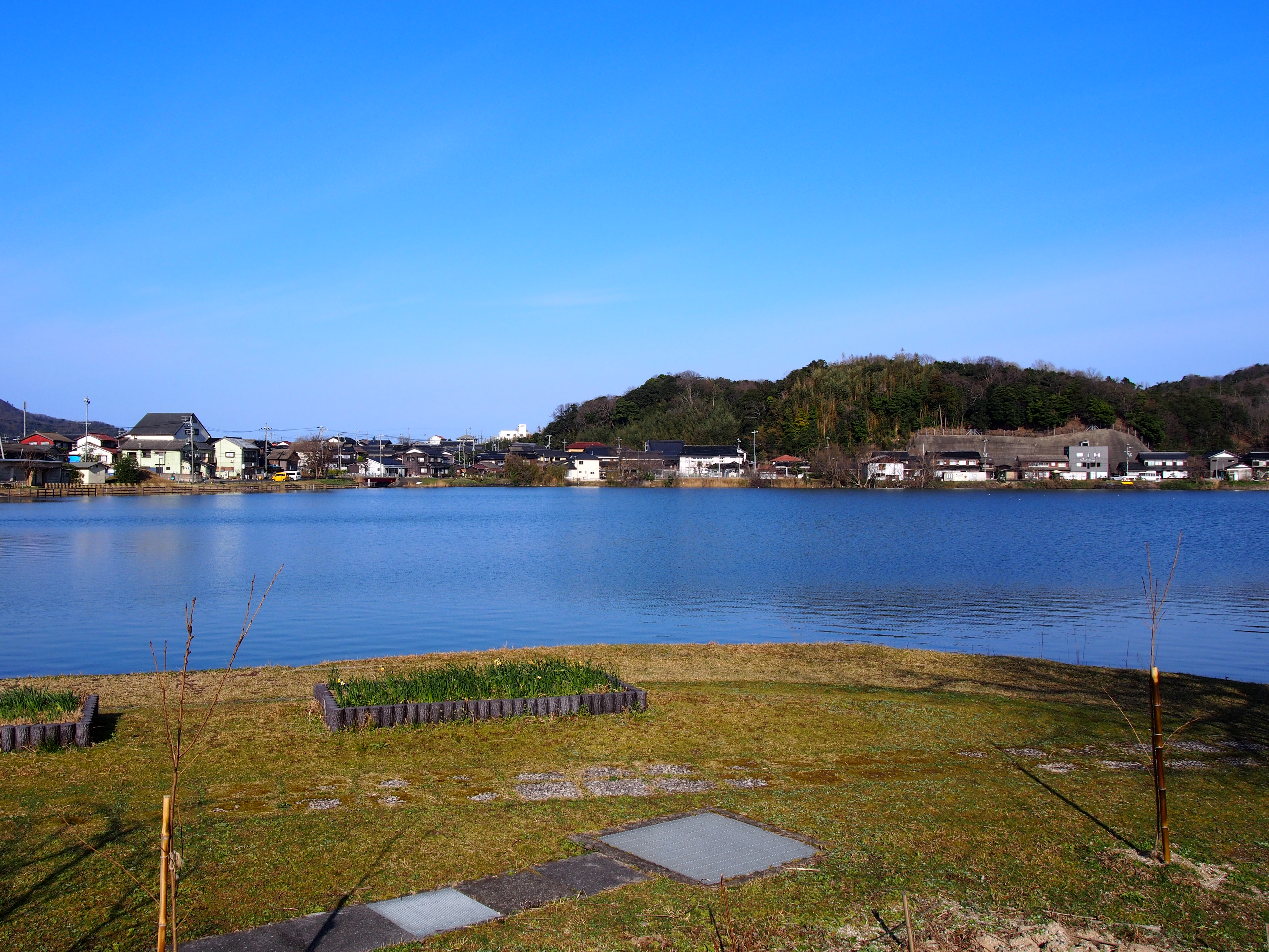 離湖(京都府京丹後市網野町小浜) 離湖公園内より網野町小浜集落を臨む。